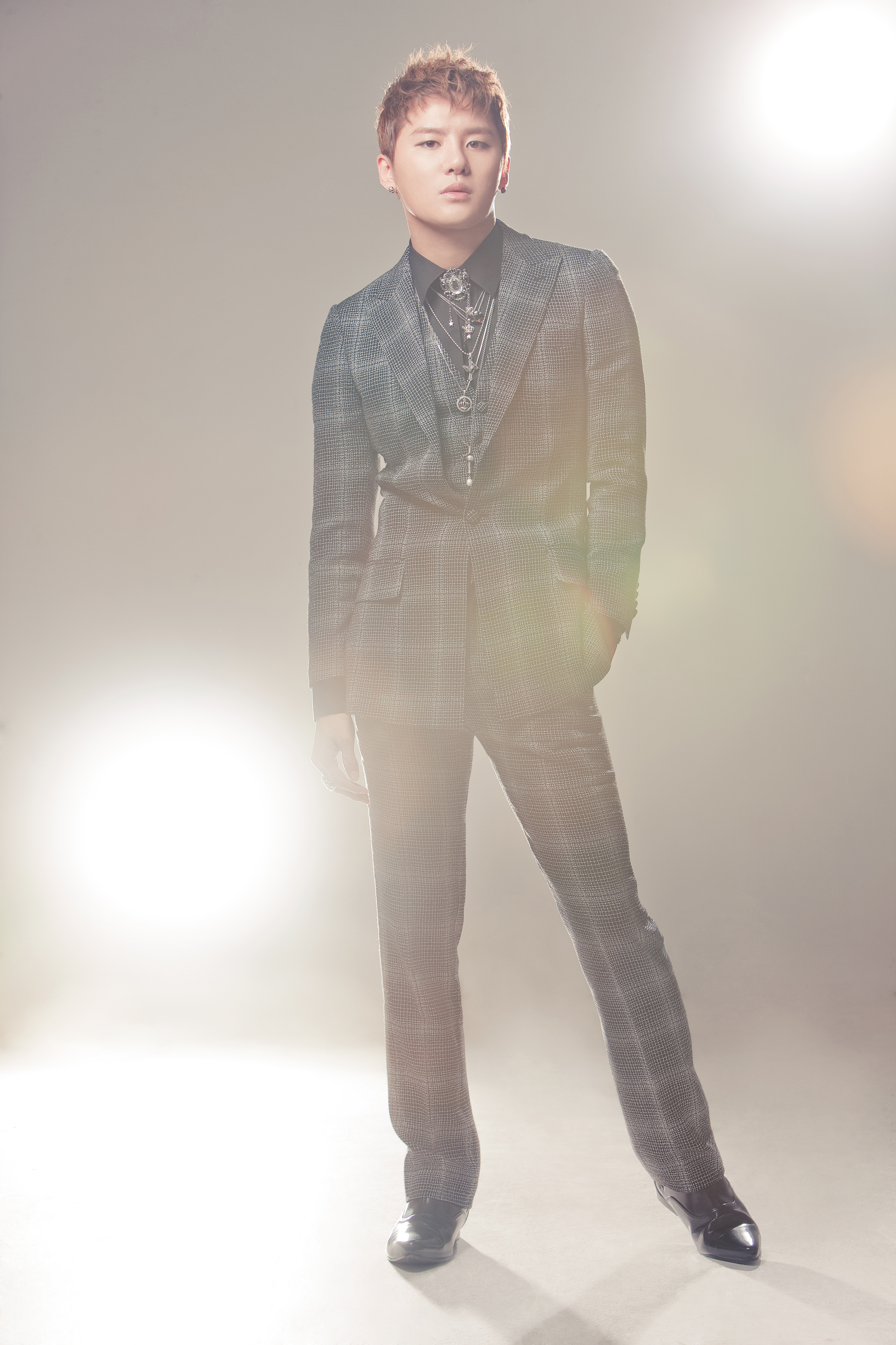 LG 옵티머스 Q2 광고 사진 - JYJ